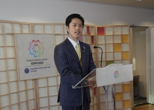 日本政府主催レセプションでの吉村洋文。